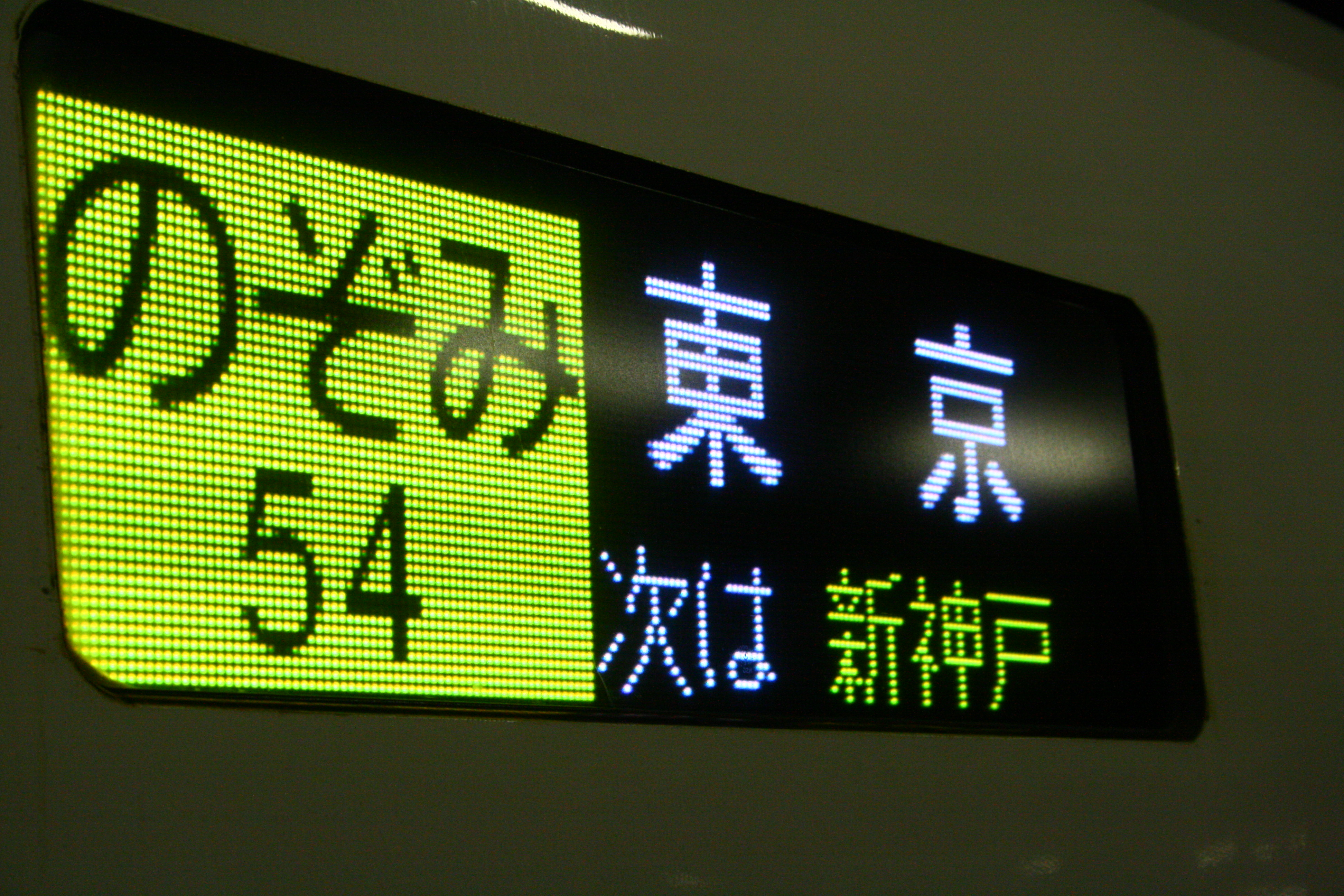 N700系列車的電子牌，圖為希望號列車54號